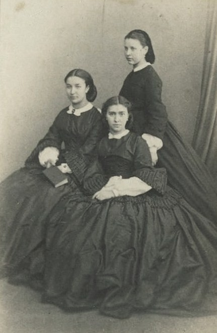 Адель Борисовна, Ольга Борисовна Татьяна Борисовна Данзас